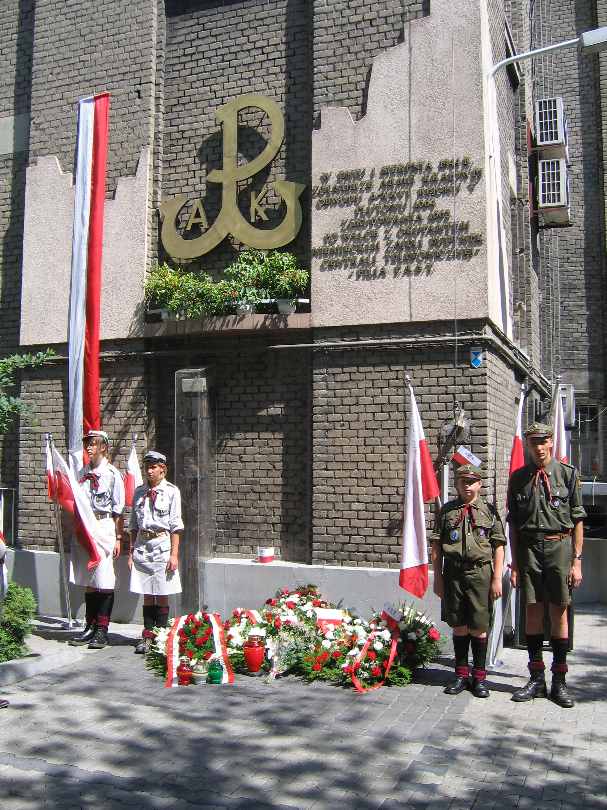 Harcerze 17 WDH, rocznica wybuchu powstania warszawskiego, centrala telefoniczna przy ul. Brzeskiej, 2006-07-31